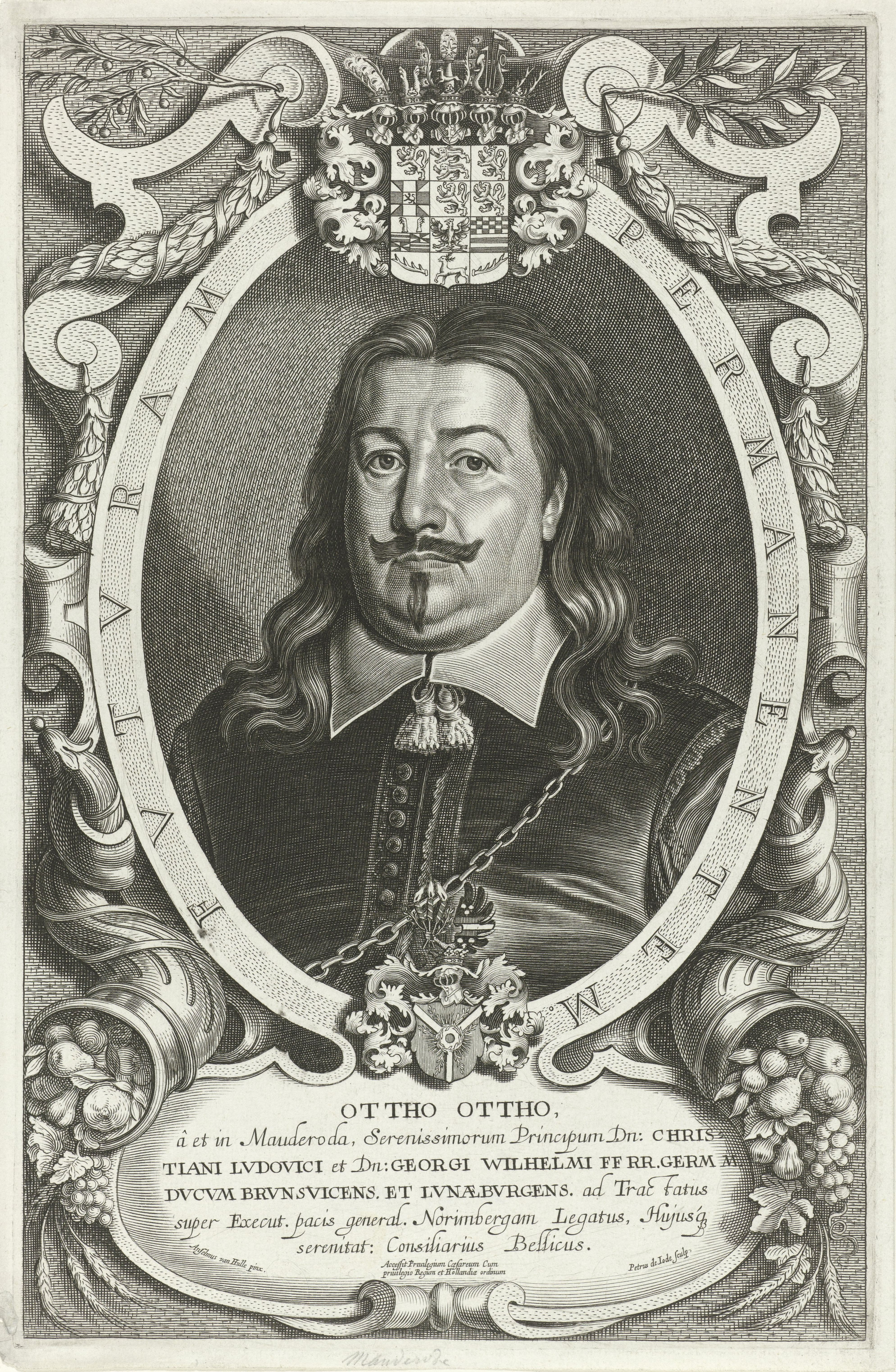 IdentificatieTitel(s): Portret van Otto Otto von MauderodeCeleberrimi Legati (serietitel)Objecttype: prent Objectnummer: RP-P-OB-7801Catalogusreferentie: Hollstein Dutch 385-5151(2)Opmerking: staat bepaald aan de hand van aanwezige prenten in RijksprentenkabinetOpschriften / Merken: verzamelaarsmerk, verso, gestempeld: Lugt 2228Omschrijving: Busteportret van Otto Otto von Mauderode. Het portret is gevat in een ovale omlijsting met het wapenschild van de geportretteerde, decoraties en een randschrift in het Latijn. In de cartouche een zesregelig onderschrift in het Latijn. Prent uit een serie portretten naar schilderijen van Anselmus van Hulle van alle gedelegeerden bij de vredesonderhandelingen te Münster en Osnabrück.VervaardigingVervaardiger: prentmaker: Pieter de Jode (II) (vermeld op object)naar schilderij van: Anselm van Hulle (vermeld op object)verlener van privilege: Staten van Holland (vermeld op object)Plaats vervaardiging: AntwerpenDatering: 1628 - 1670Fysieke kenmerken: ets en gravureMateriaal: papier Techniek: etsen / graveren (drukprocedé)Afmetingen: plaatrand: h 313 mm × b 202 mmOnderwerpWie: Otto Otto von MauderodeVerwerving en rechtenVerwerving: onbekendCopyright: Publiek domein